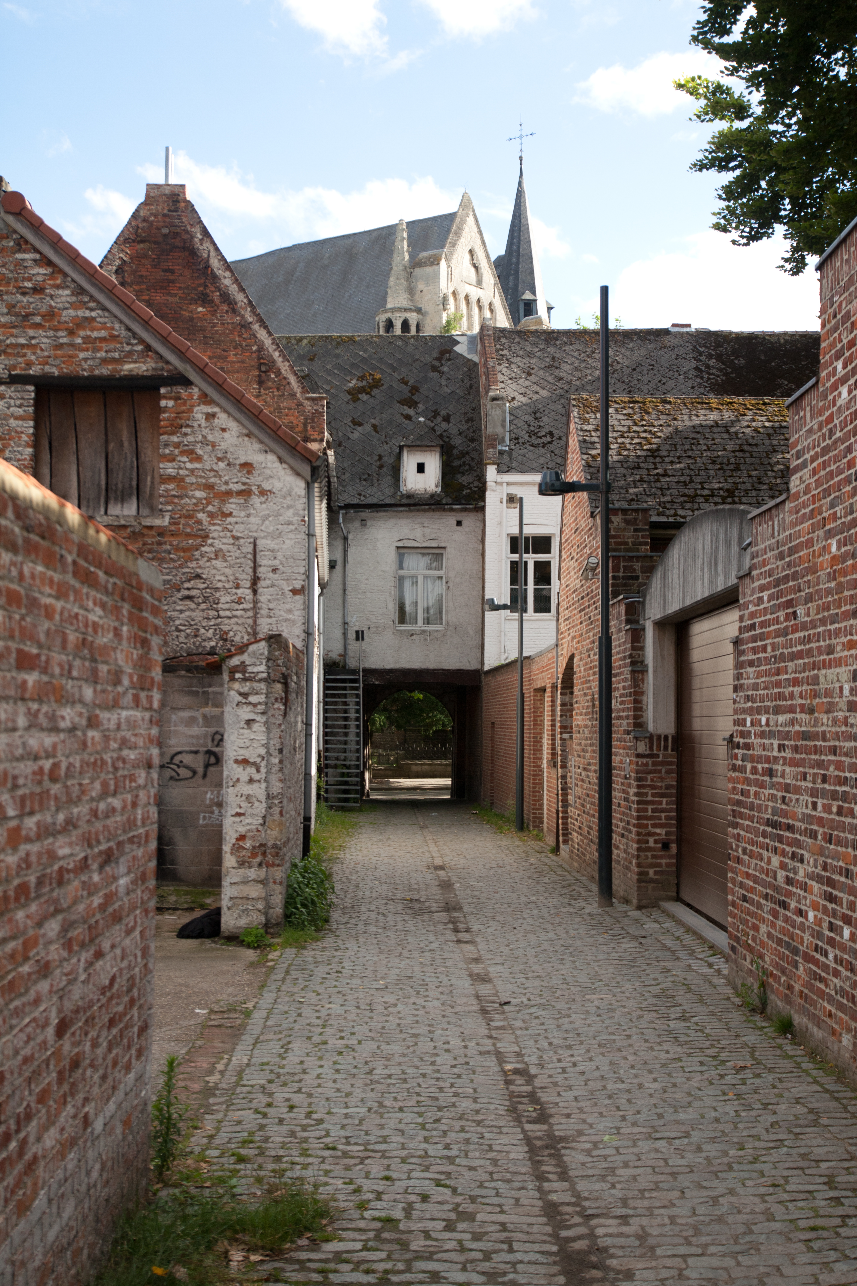 Huis De Jonghen Pfenix, gezien vanaf de Verbrande Poort te Leuven